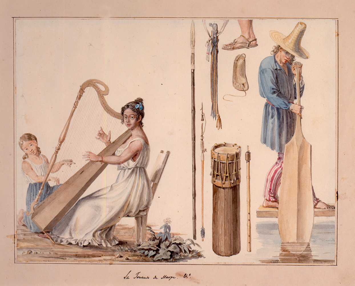 TÍTULO La joueuse de harpe (La intérprete de harpa) ARTISTA François Désiré Roulin NÚMERO DE REGISTRO AP4086 FECHA DE INGRESO A LA COLECCIÓN Viernes, Noviembre 21, 2003 TÉCNICA Acuarela sobre papel DENOMINACIÓN Acuarela DIMENSIONES 20,3 x 26,7 cm